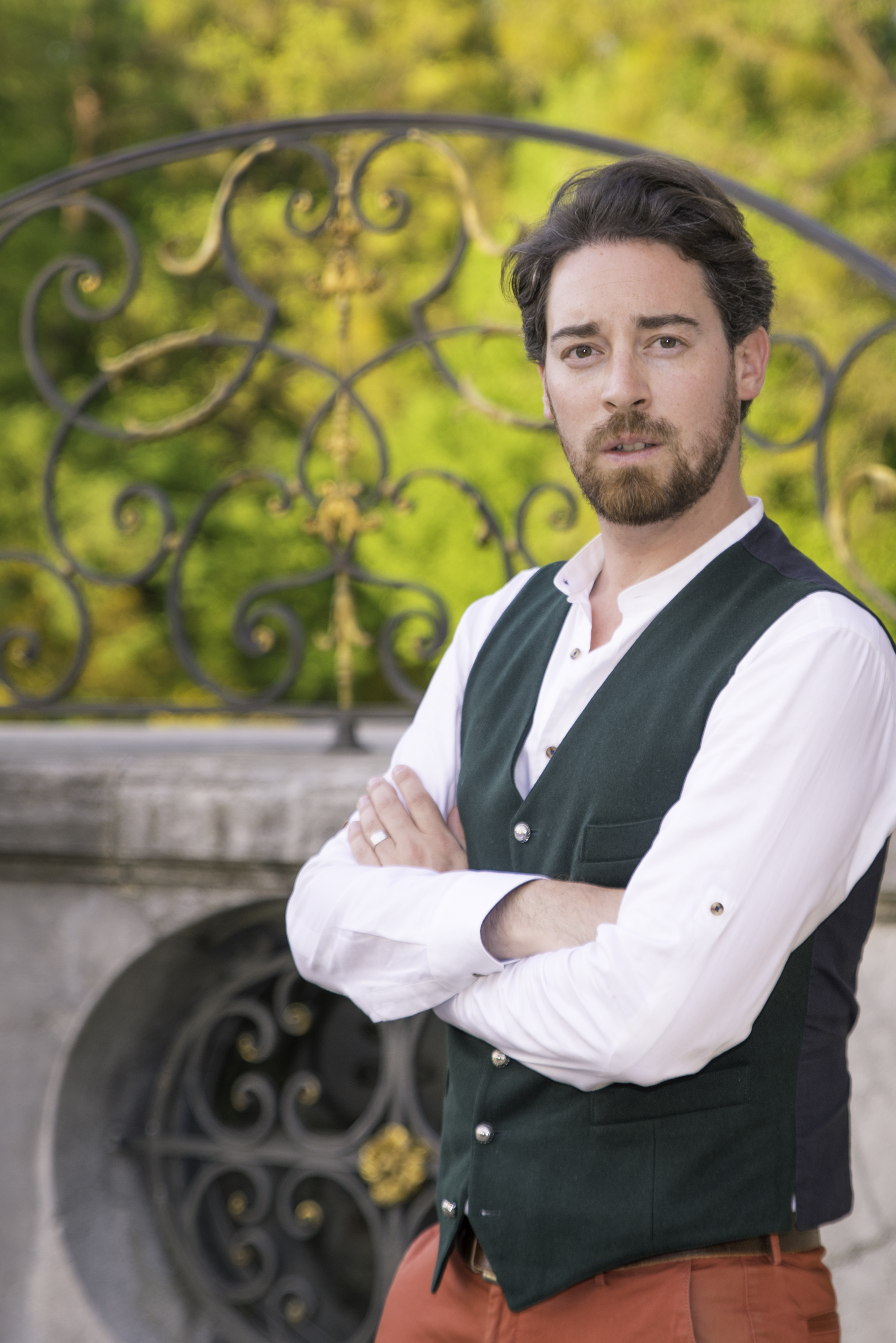 Porträt von Andreas Schlierf 2018